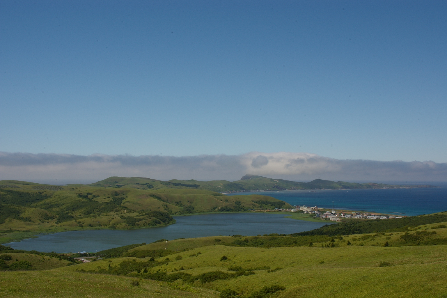 Lake Kusyu, Rebun island hokkaido.